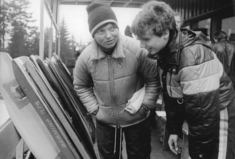 Kathrin Risch, Margit Schumann ADN-ZB Schaar 19.10.1984-Bez. Suhl: Saison-Auftakt der Rennschlittensportler-Mit den Handicap-Wettbewerben begann auf der Oberhofer Kunsteisbahn die neue Saison im Rennschlittensport. Vor dem Start erhält die junge Kathrin Risch (ASK Vorwärts Oberhof) vom Nachwuchstrainerin Margit Schumann - ehemalige Olympiasiegerin und Weltmeisterin - letzte Hinweise.